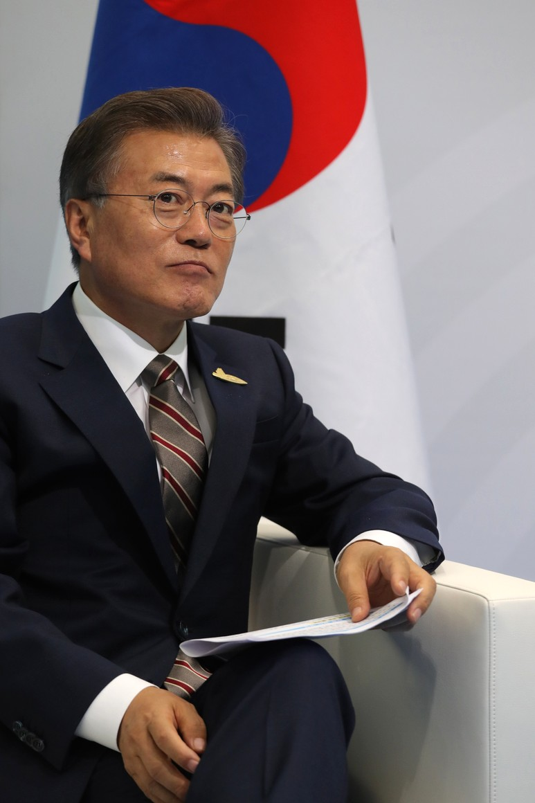 Президент Республики Корея Мун Чжэ Ин во время встречи с Президентом России Владимиром Путиным